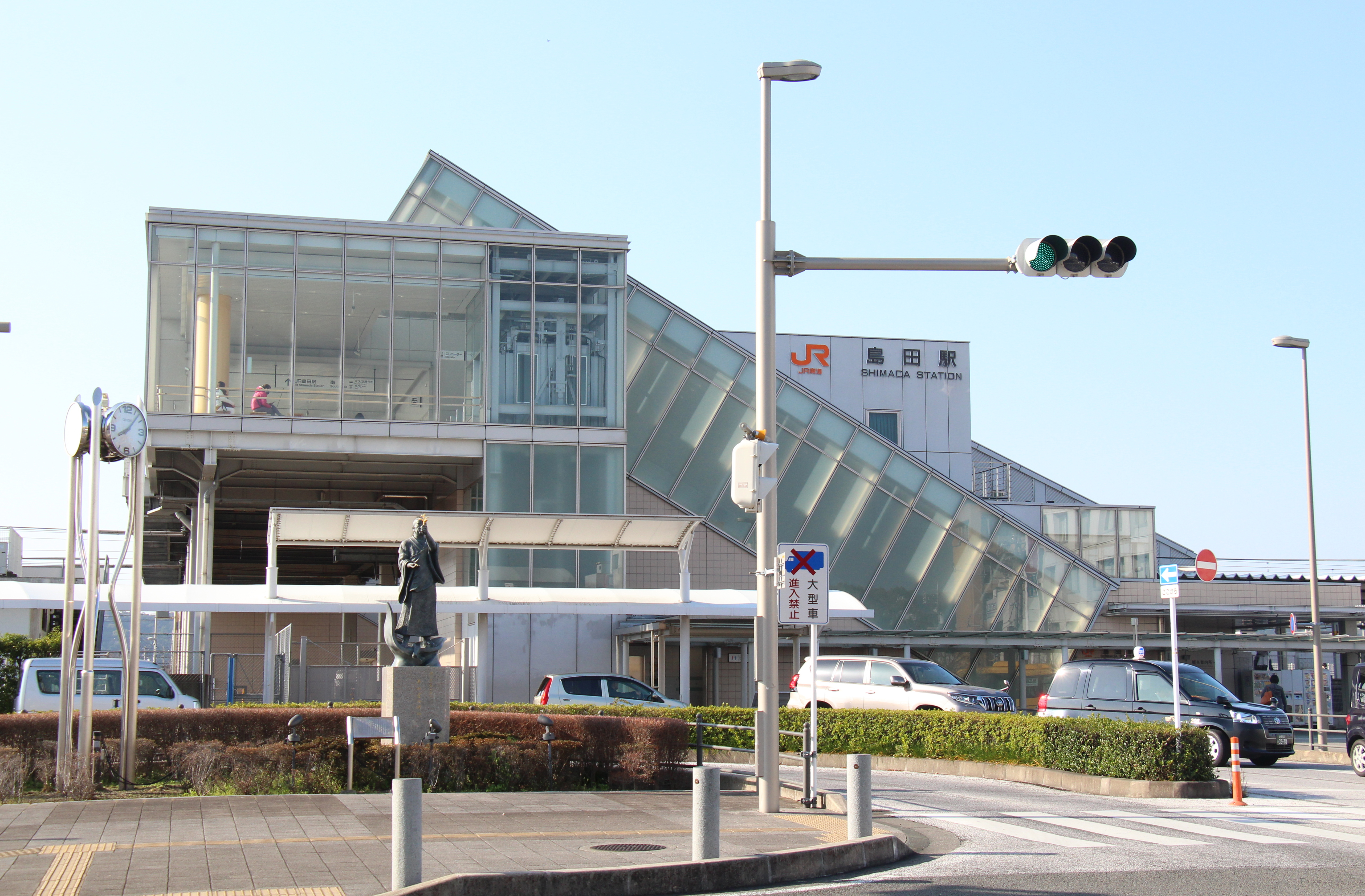 東海道本線島田駅北口の外観を北側から撮影した。